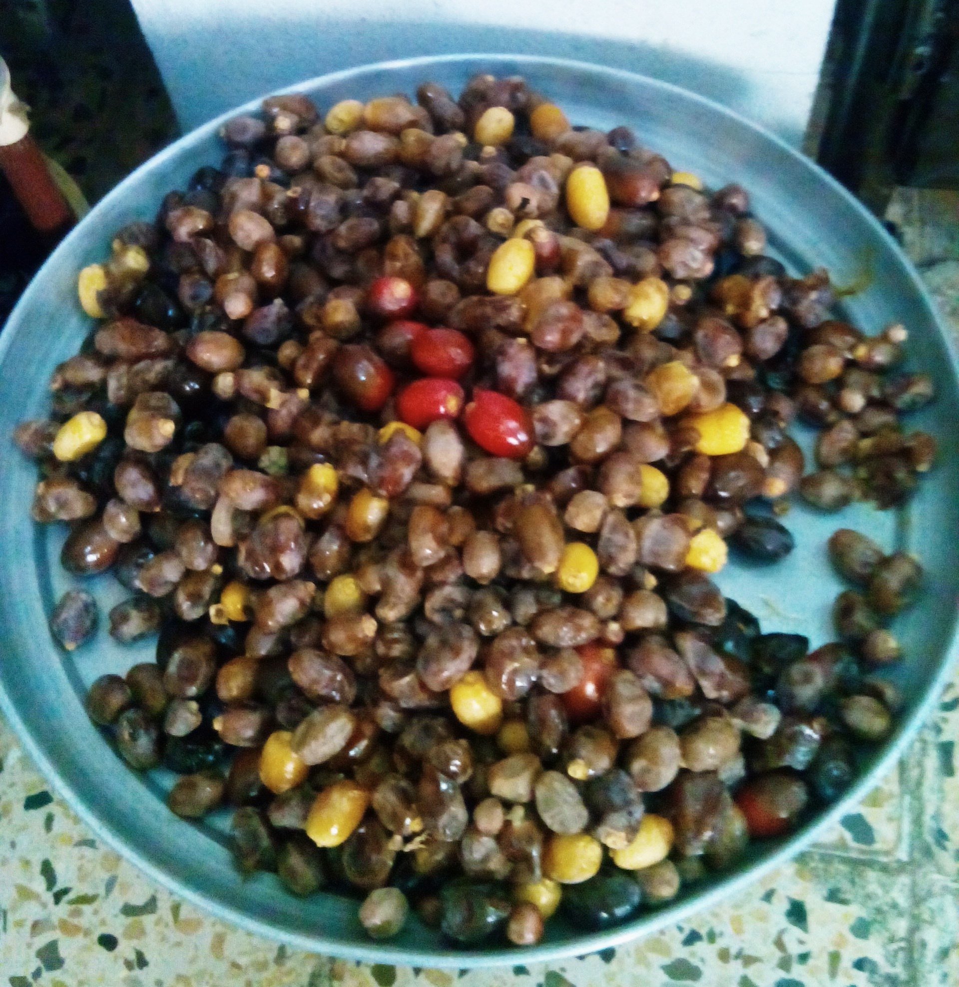 تمر ناضج من ثمار نخيل العراق